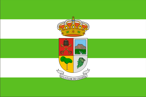 Bandera de Vilaflor (Santa Cruz de Tenerife, España)